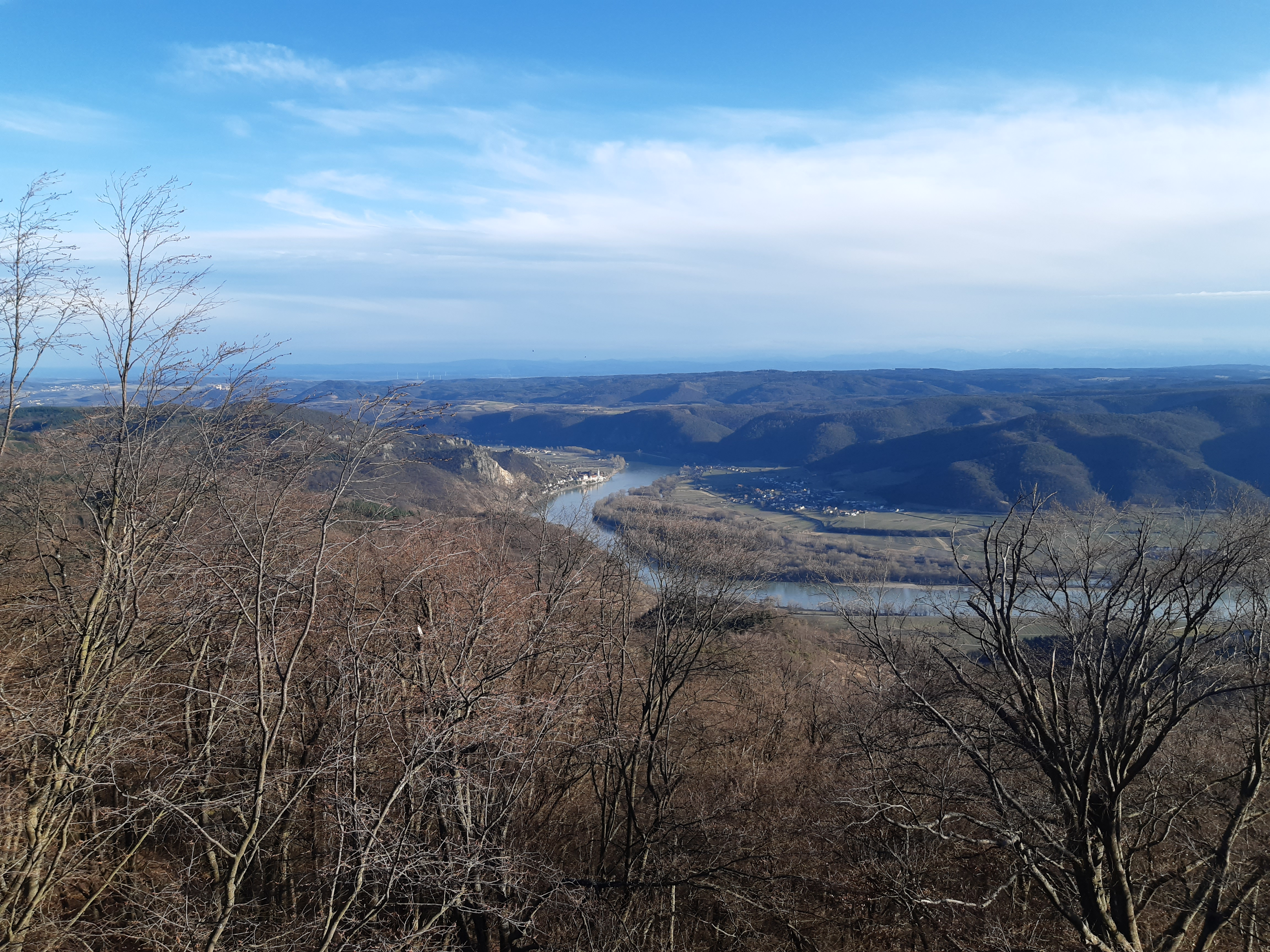 Ausblick in die Wachau mit Blickrichtung Dürnstein von der Weiglwarte am Sandl (Wachau, NÖ)